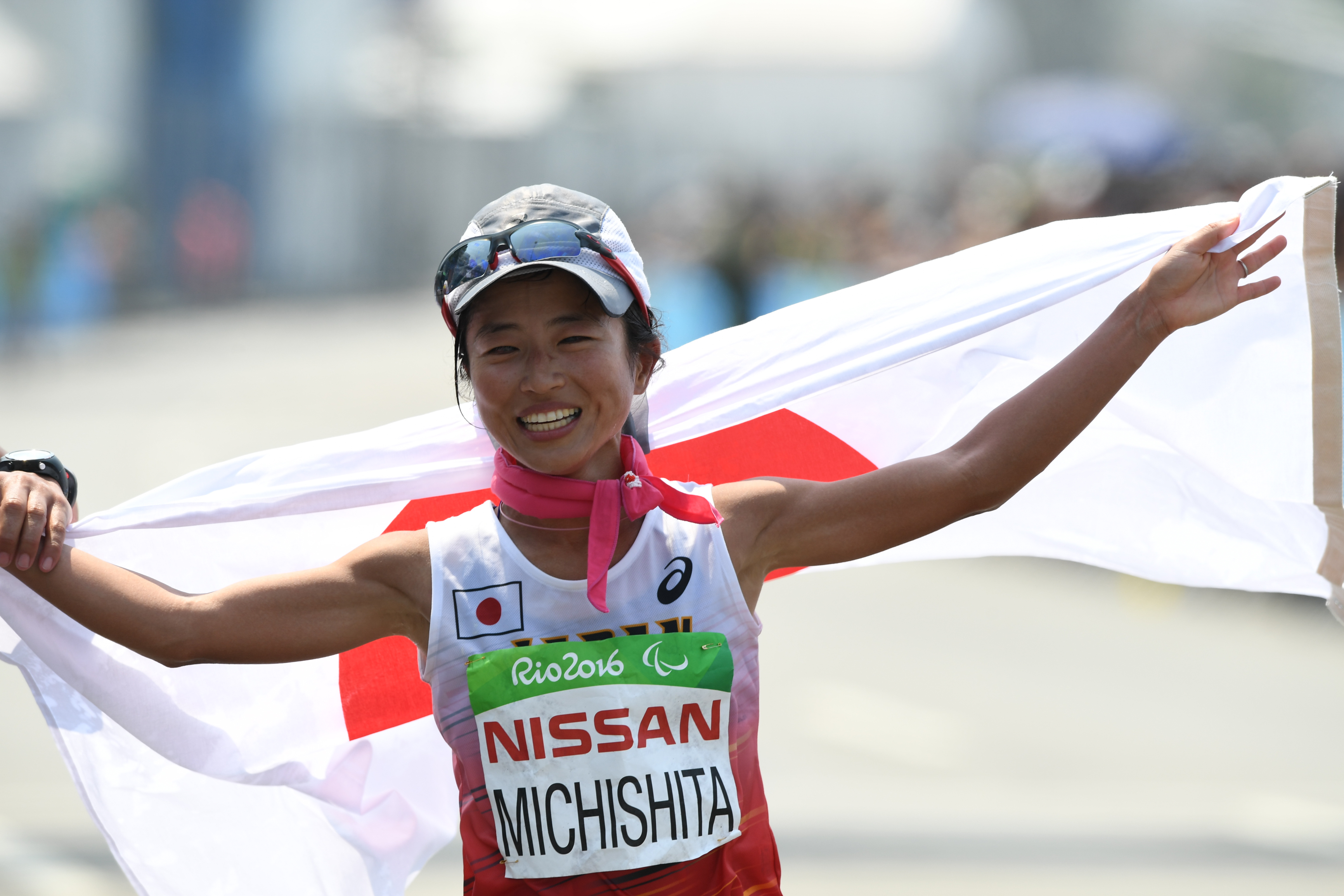 Rio de Janeiro - A japonesa Misato Michishita foi prata na categoria T12 na maratona Paralímpica T12 e T46, na praia de Copacabana (Tânia Rêgo/Agência Brasil)